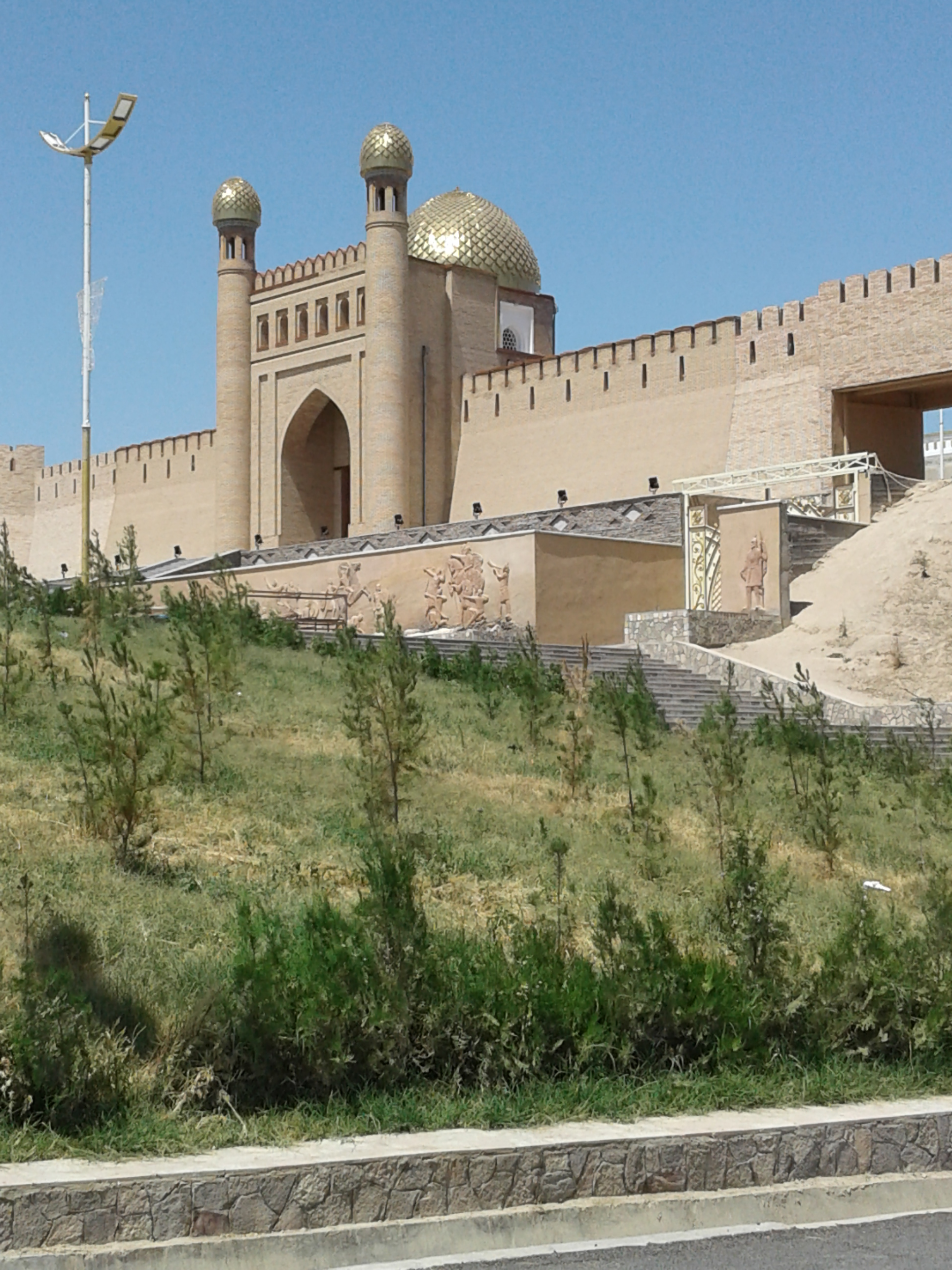 Крепость в Истаравшане (Калъаи Муг). После реконструкции в 2018 г.